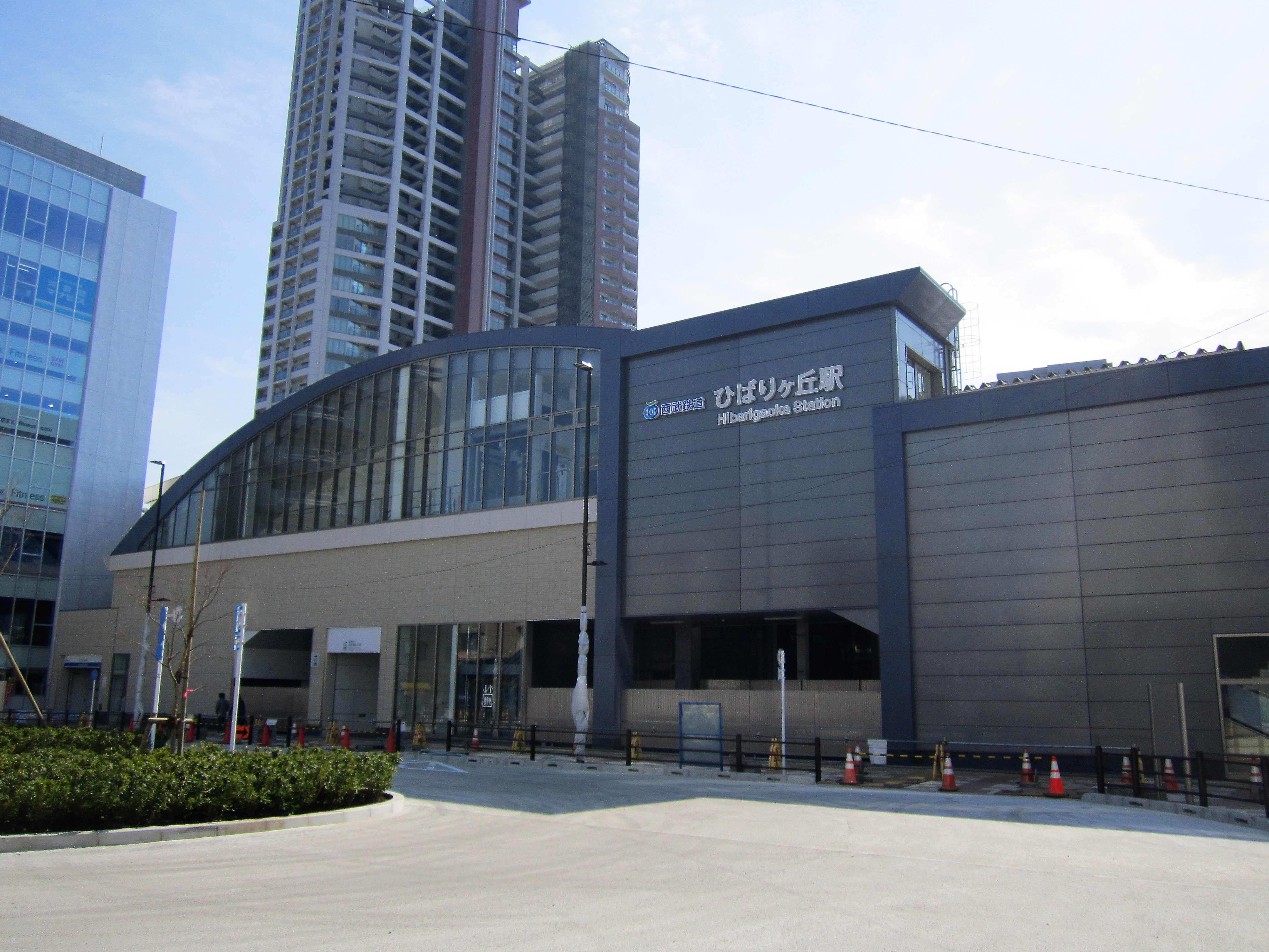 ひばりヶ丘駅北口の新駅舎 Canon PowerShot A2200